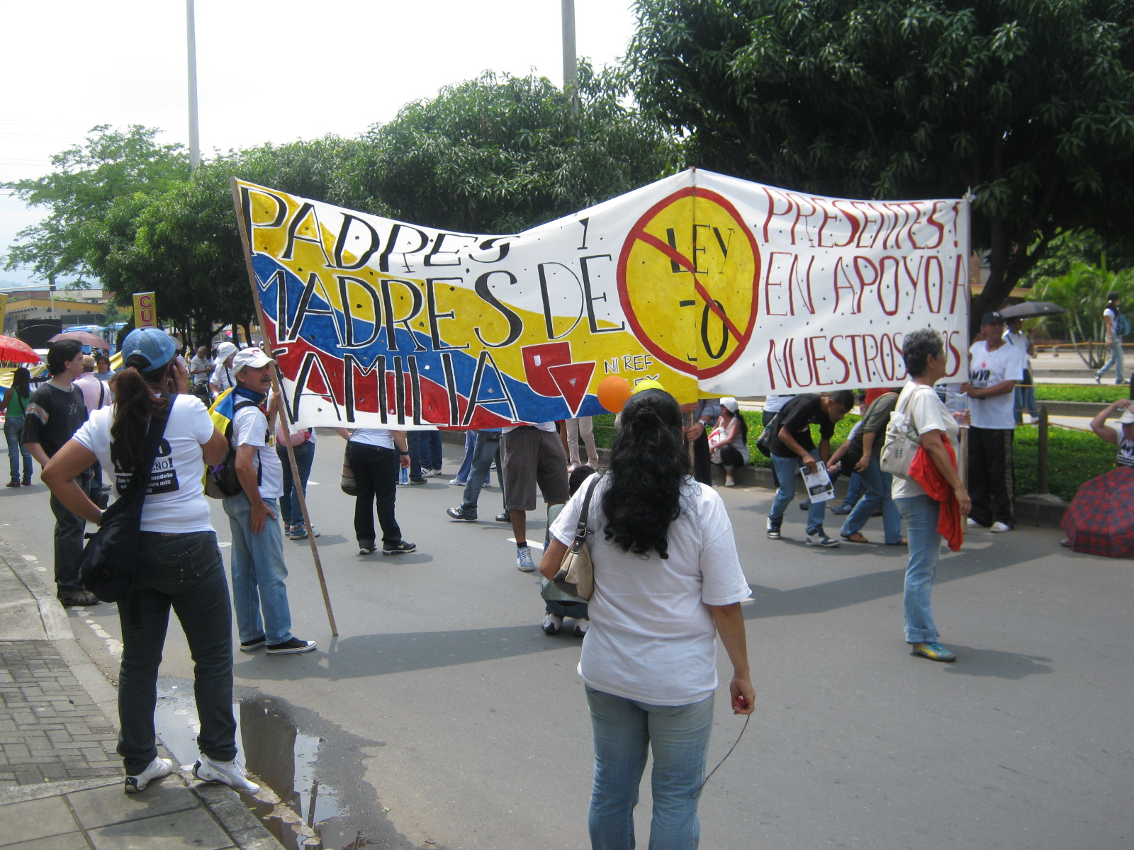 Padres de Familia apoyando la marcha estudiantil